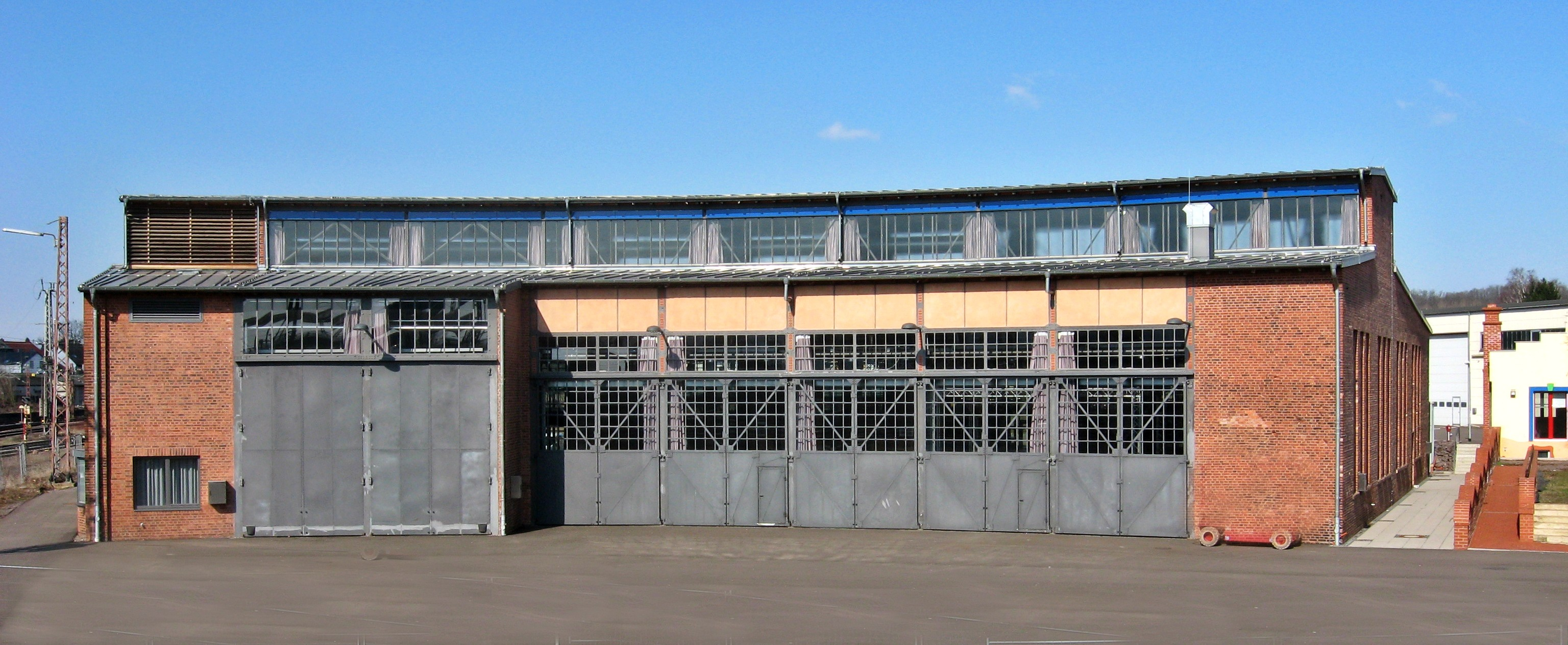 Lokschuppen (Einzeldenkmal) in Dillingen